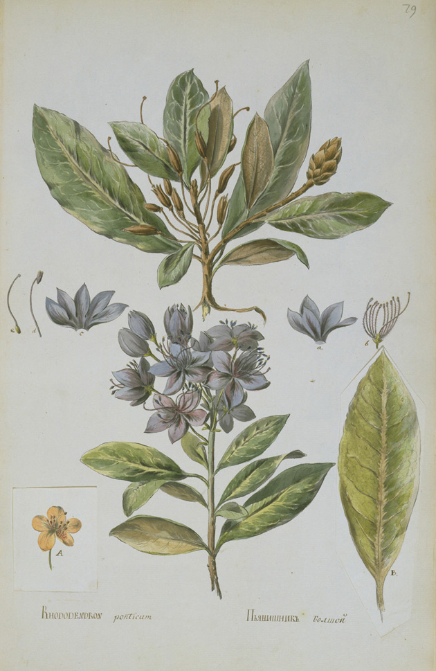 K.Knappe. Rhododendron ponticum, from: Peter Simon Pallas (1741–1811) Flora Rossica [The Flora of Russia] St. Petersburg: J. J. Weitbrecht, 1784–88